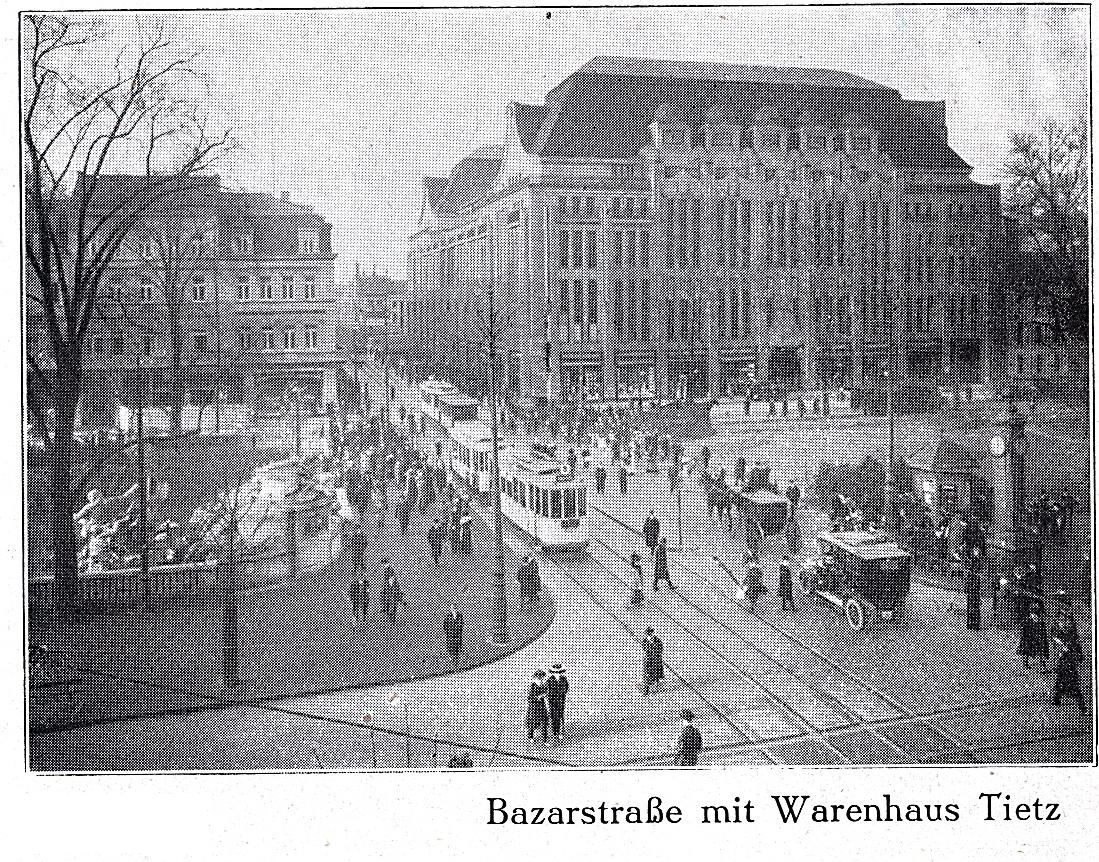 Warenhaus der Leonhard Tietz AG in Düsseldorf; erbaut 1907-1909 nach Entwurf des Architekten Josef Maria Olbrich († 1908)